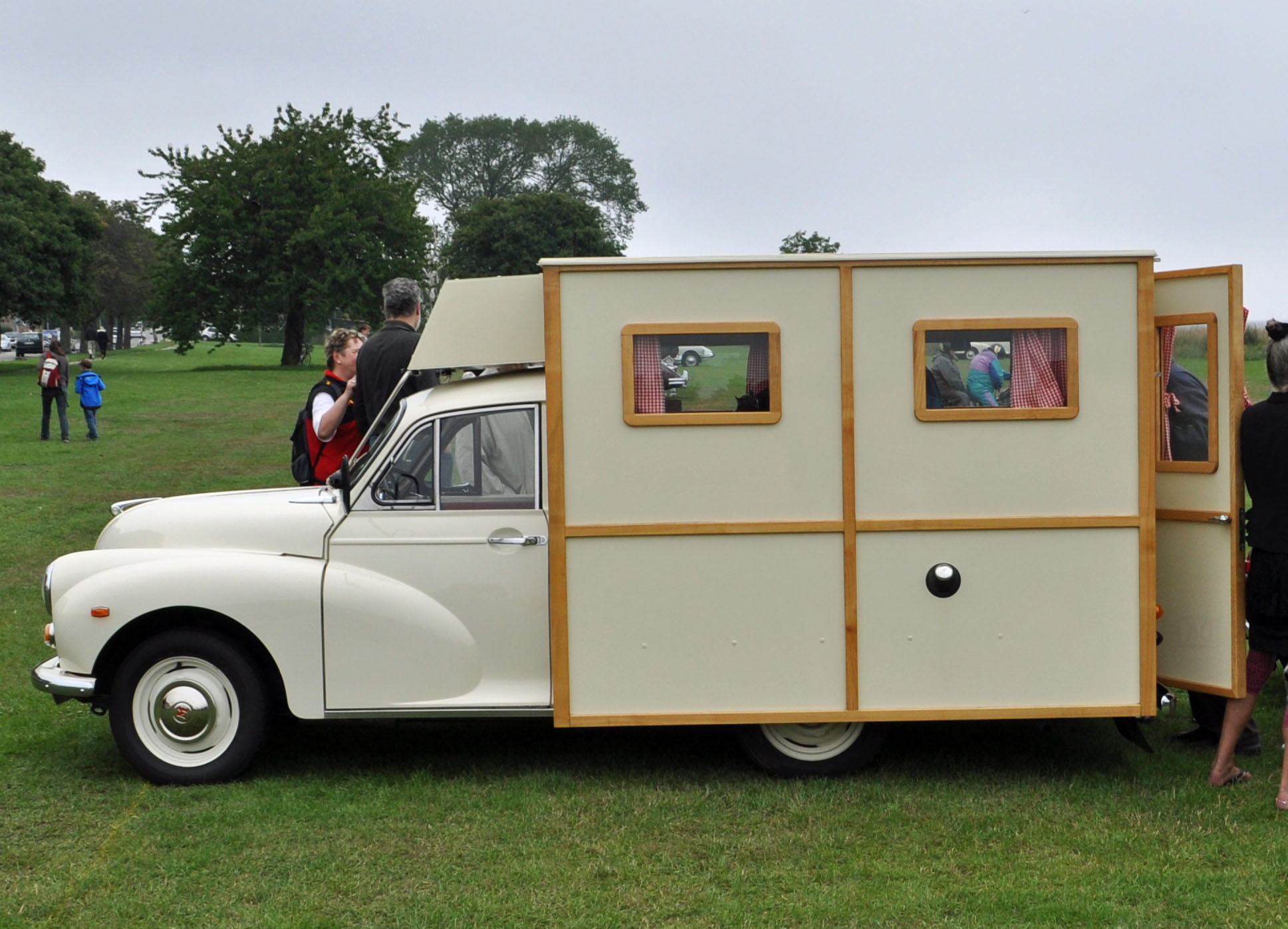 Das Foto zeigt einen Teilnehmer der Classic-Car-Race "Bornholm Rundt 2012" im Juli 2012 auf Bornholm, Dänemark. Morris